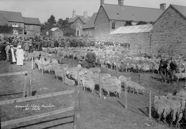 Ffotograffydd/Photographer: P B Abery (1877?-1948) Dyddiad/Date: [192-?] Cyfrwng/Medium: Negydd gwydr / Glass negative Maint/Dimensions: 119 x 163 mm. Cyfeiriad/Reference: PBA61/44a Rhif cofnod / Record no.: 4546595 Rhagor o wybodaeth am gasgliad P B Abery yn Llyfrgell Genedlaethol Cymru More information about the P B Abery Collection at the National Library of Wales